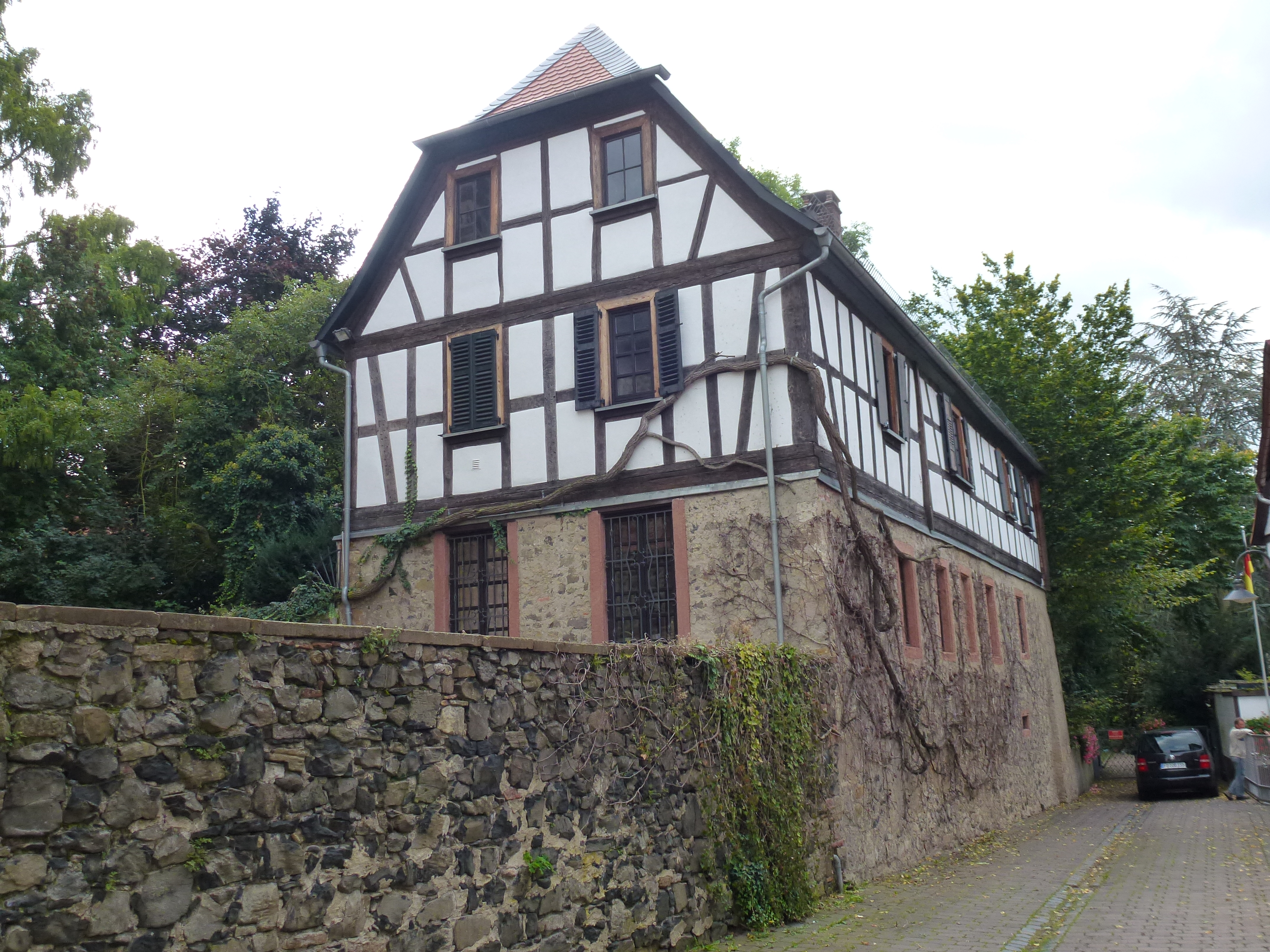 Ehemals als Schule genutztes Gebäude in der Mühlenstraße 5 mit einem erhaltenen Teil der Stadtmauer in Assenheim (Niddatal)